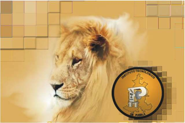 mascota del itp